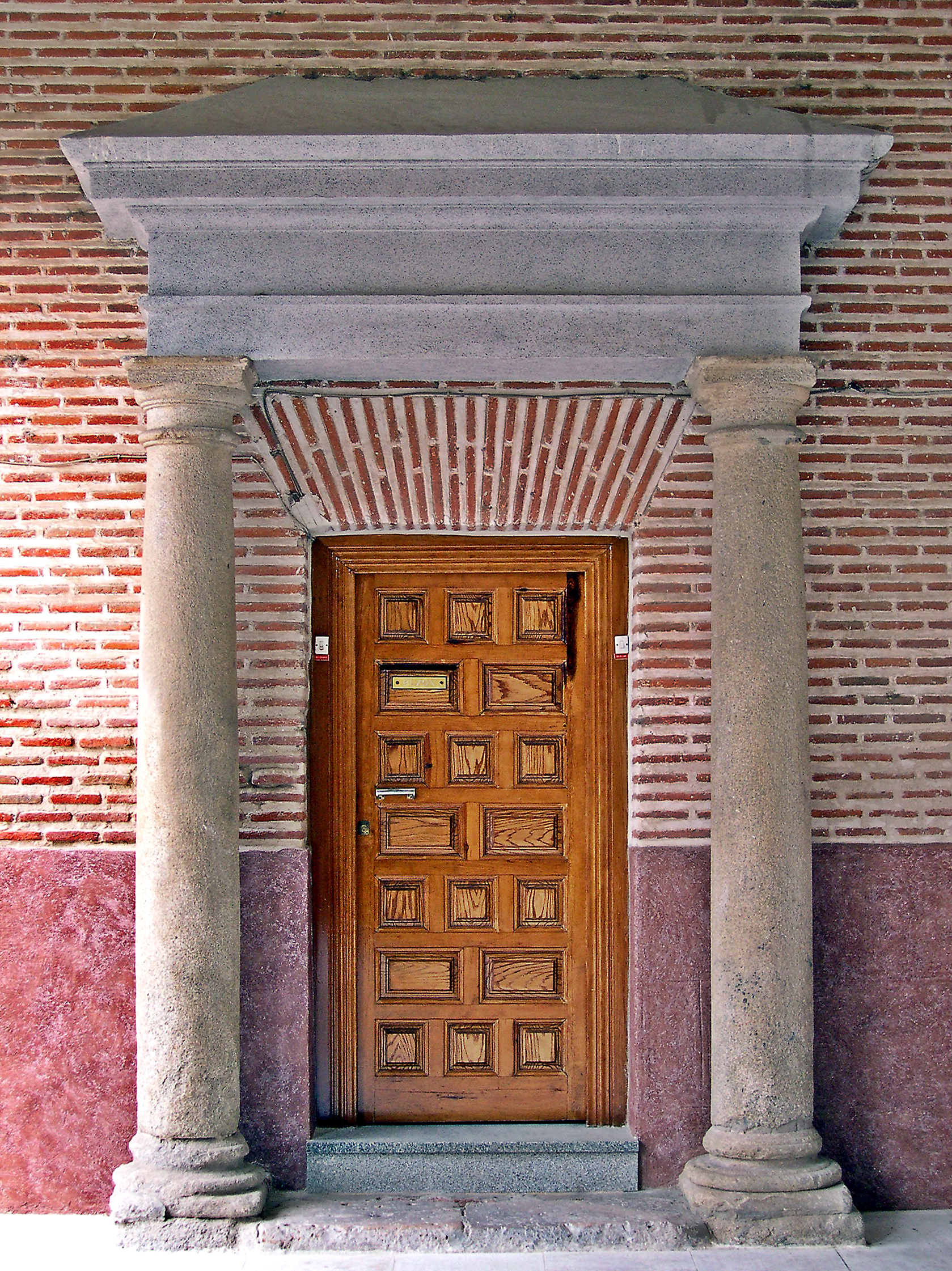 Porche de orden toscano, carece de podio pero tiene el entablamento